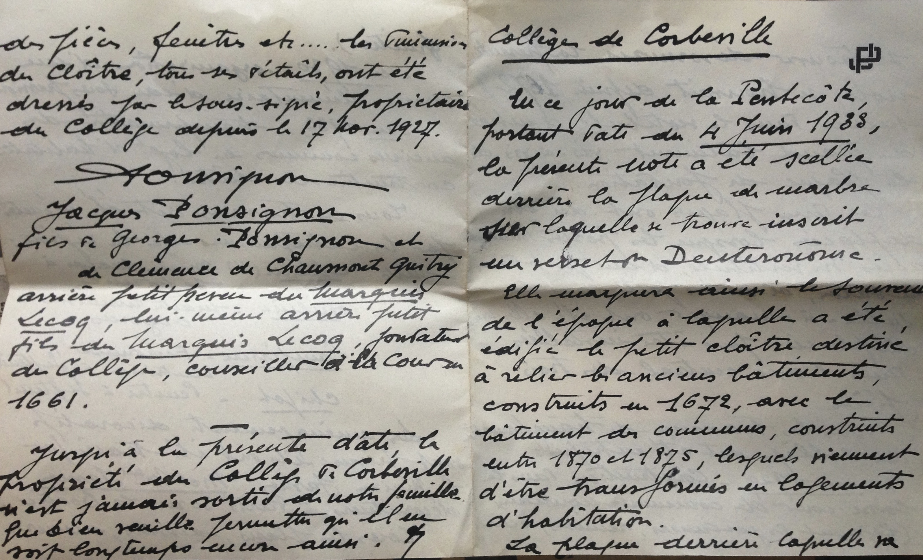 Courrier retrouvé lors des travaux entrepris en 2013